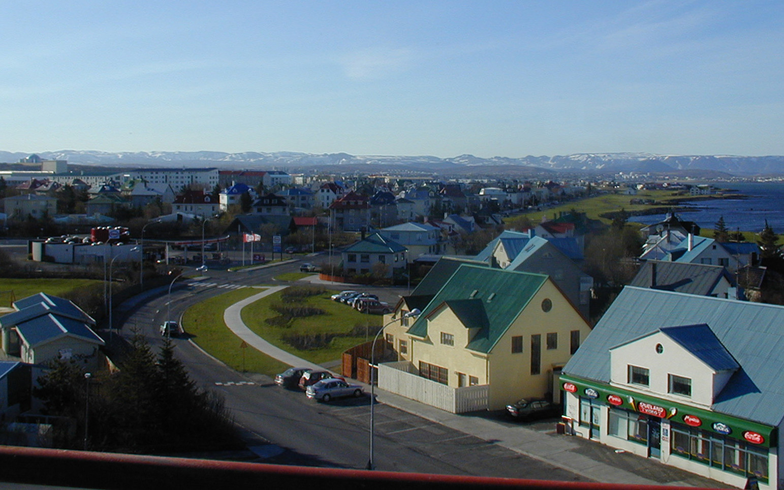 Von Kaplaskjólsvegür in Reykjavík die Küste entlang die Ægisíða.